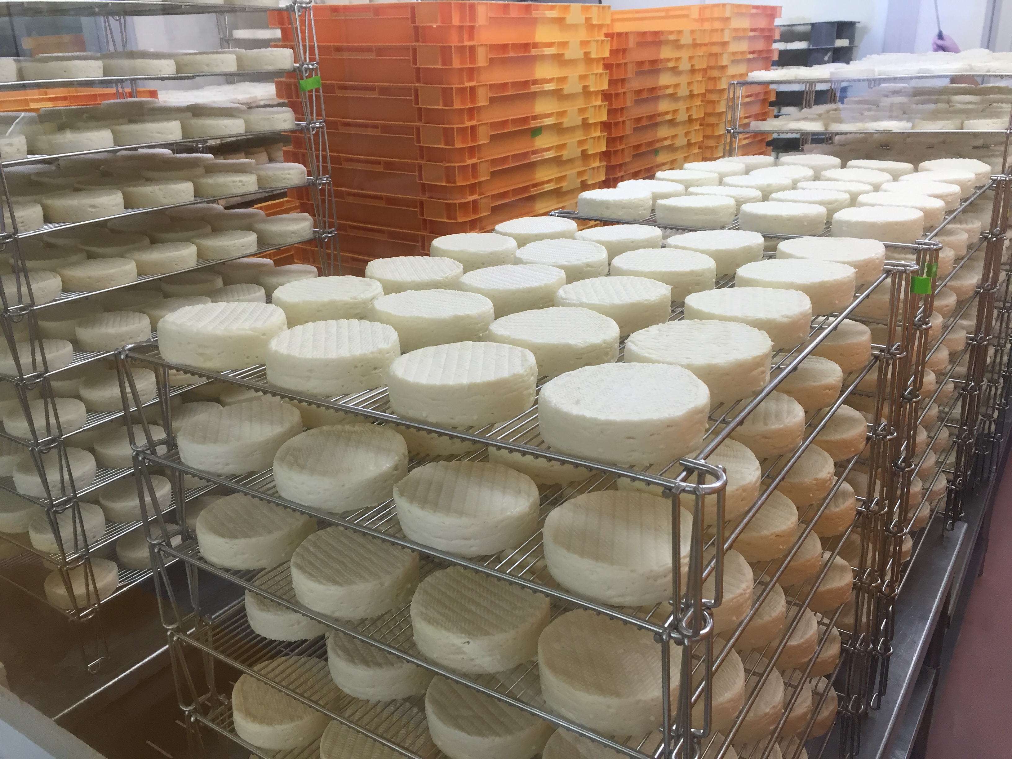 北海道帯広の花畑牧場のチーズ工場